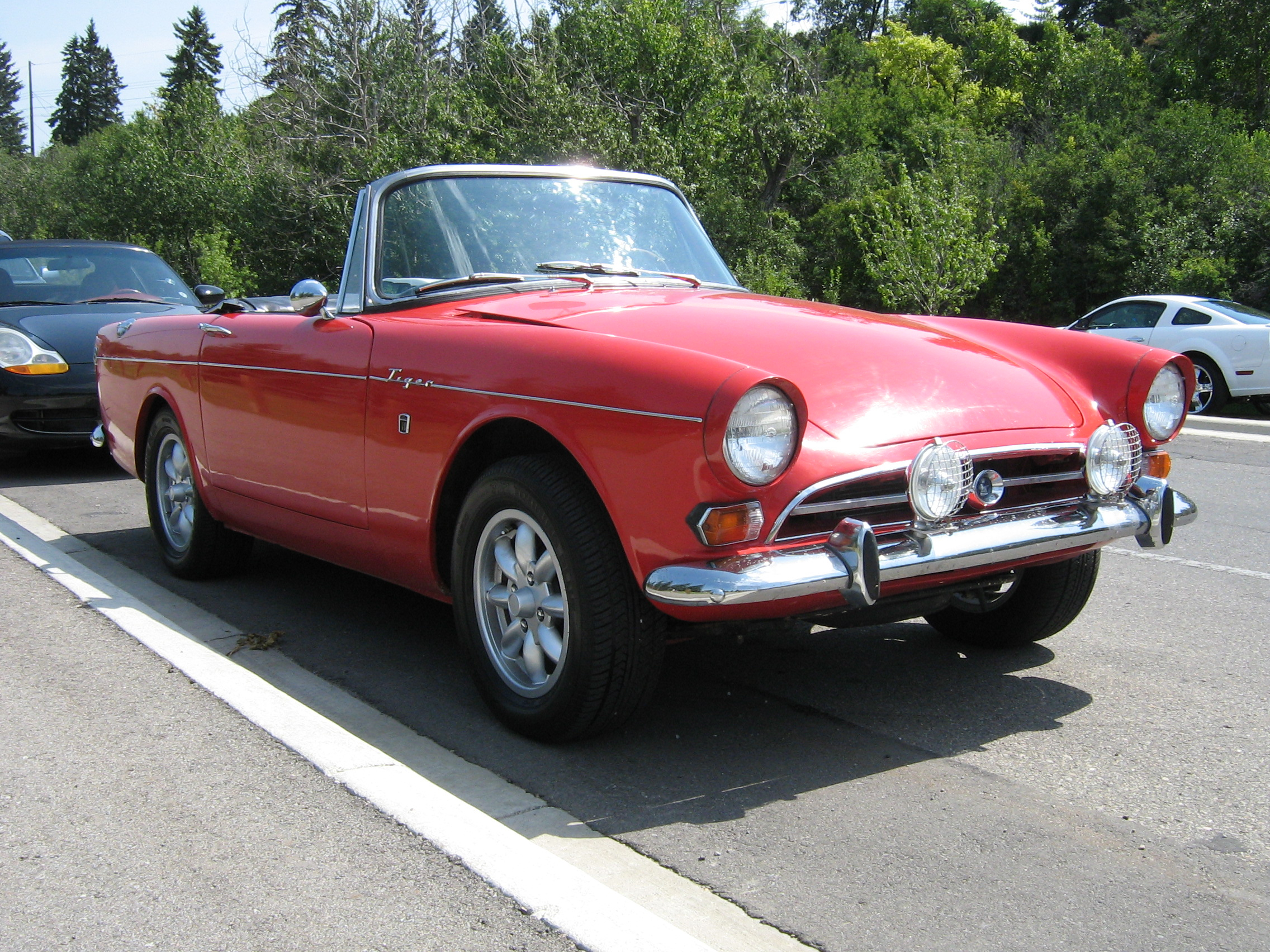 Sunbeam Tiger